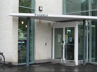 Tölö gymnasium i Helsingfors